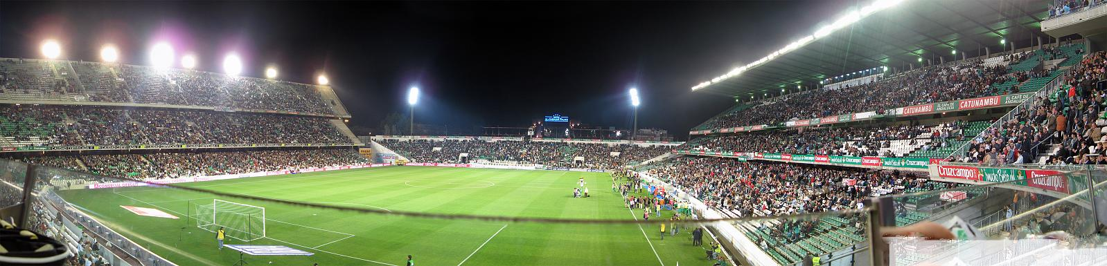 Panorama Estadio Betis 2